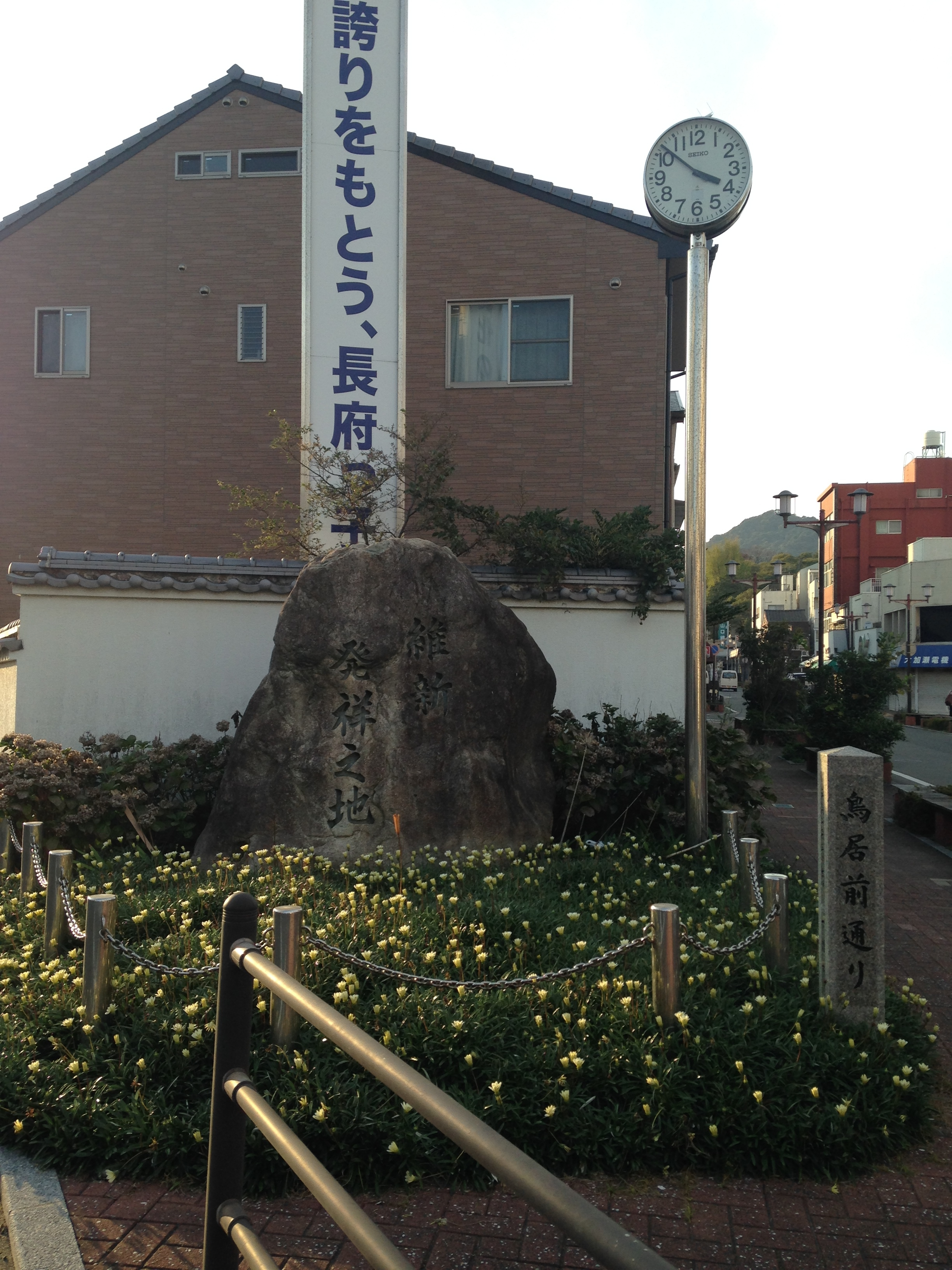 維新発祥の地・長府